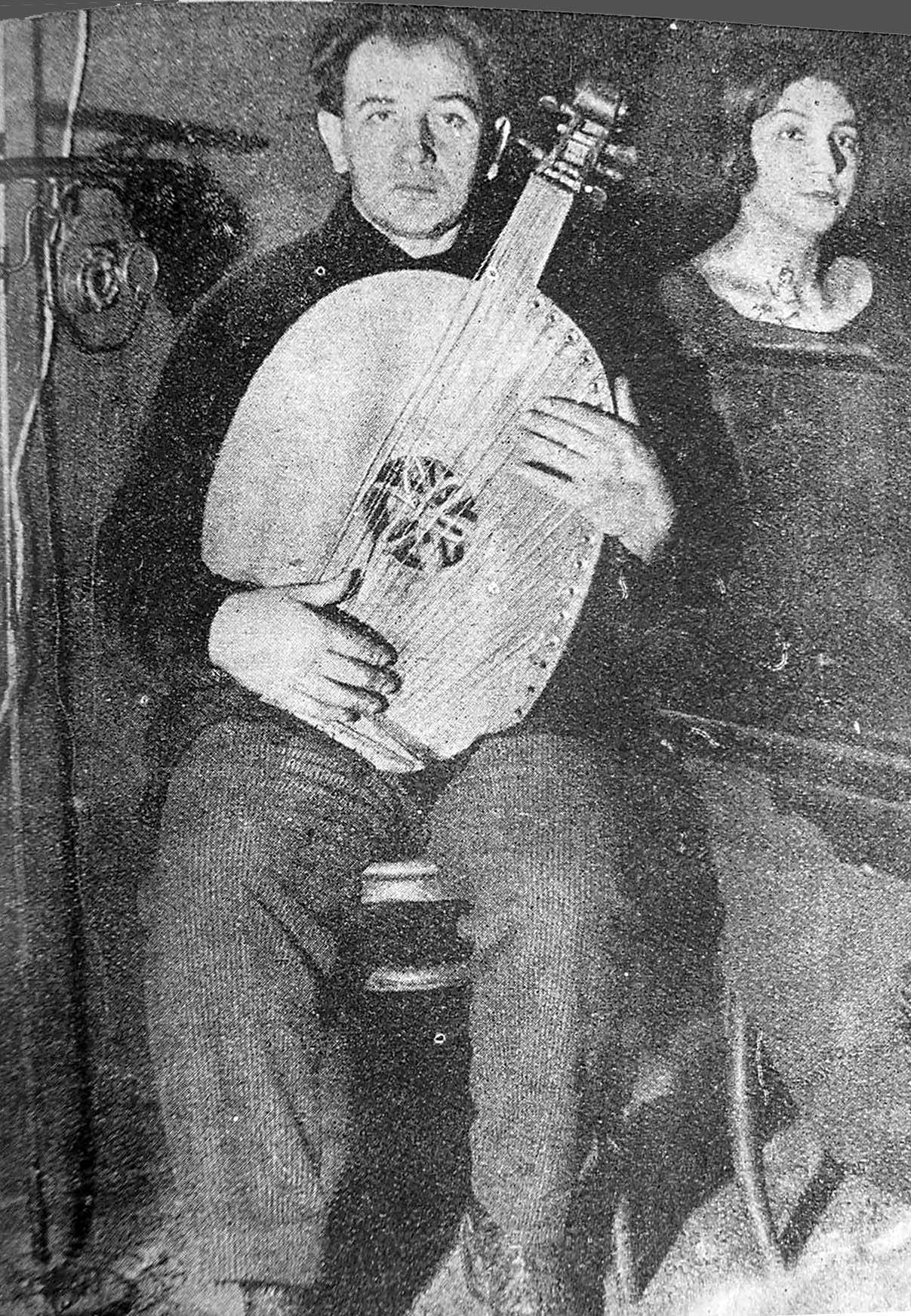 Бандурист Гамалій, біля роялю Ржецька